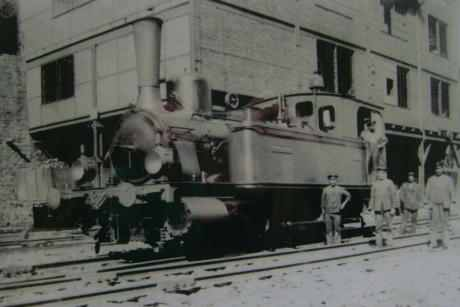 Lokomotive Nordfeld 1